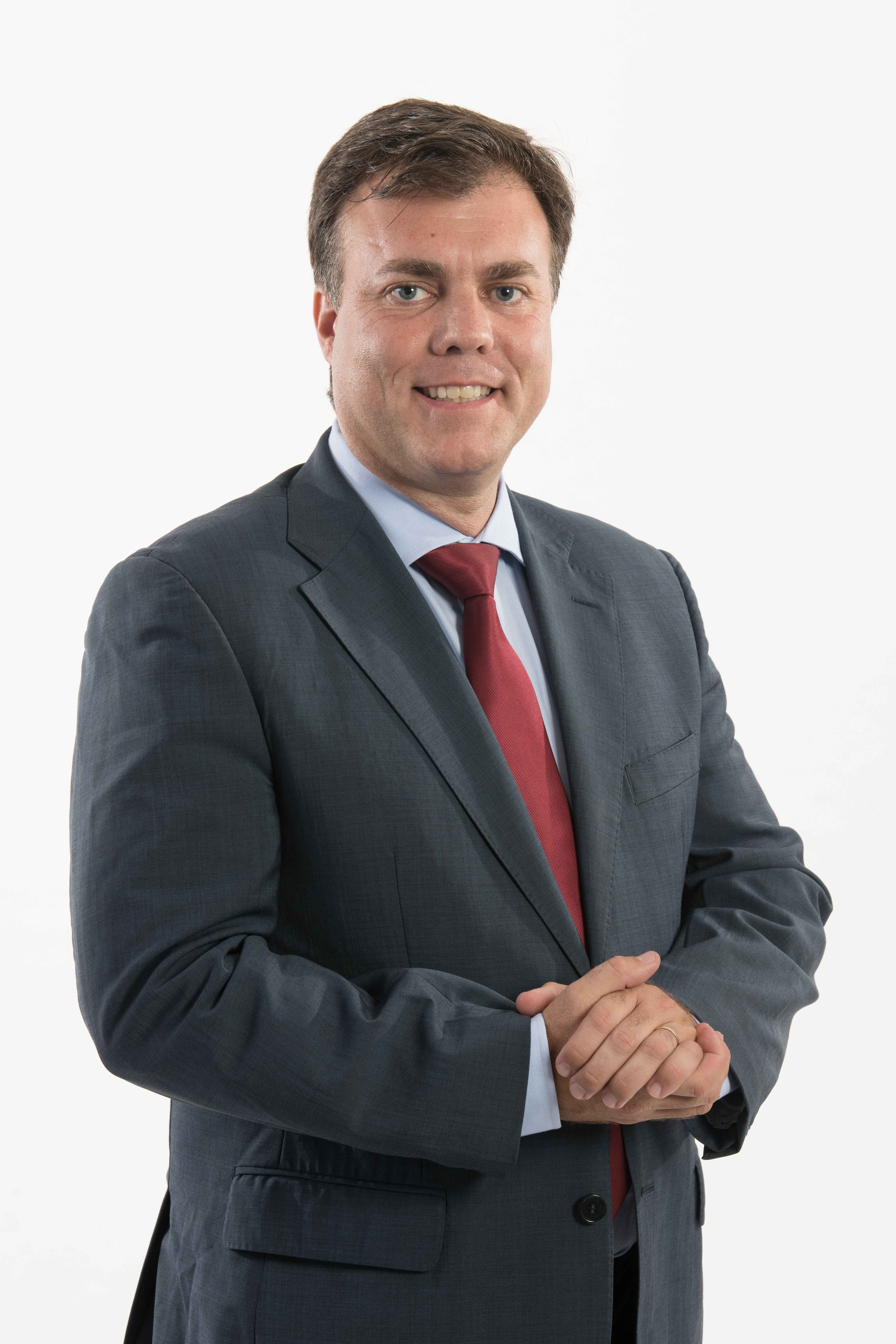 Presidente PDR